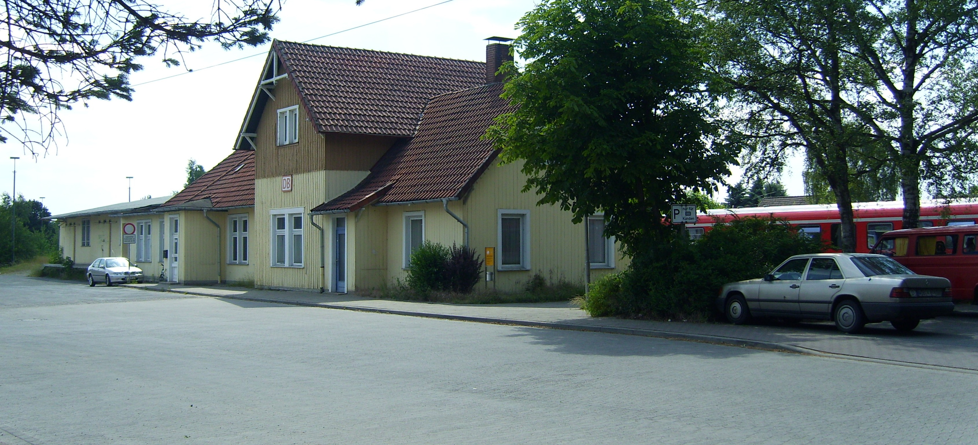 Bild des Bahnhofs Wittingen (Westseite) Wittingen station, Lower Saxony, Germany.